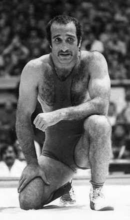 Mansour Barzegar